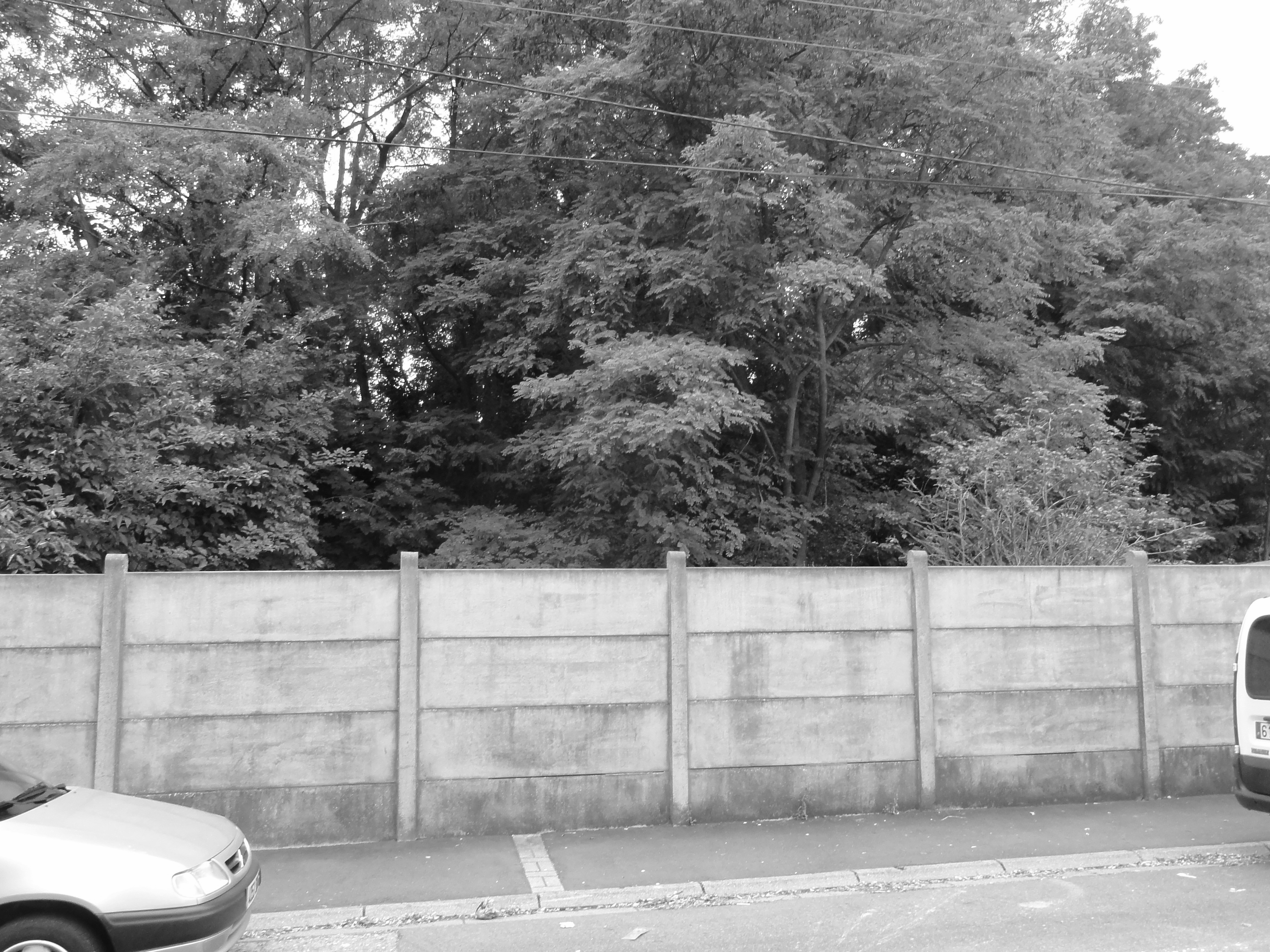 Terril n° 68A dit Cavalier du 9 de Lens, fosse n° 9 de la Compagnie des mines de Lens dans le bassin minier du Nord-Pas-de-Calais, Lens, Pas-de-Calais, Nord-Pas-de-Calais, France.